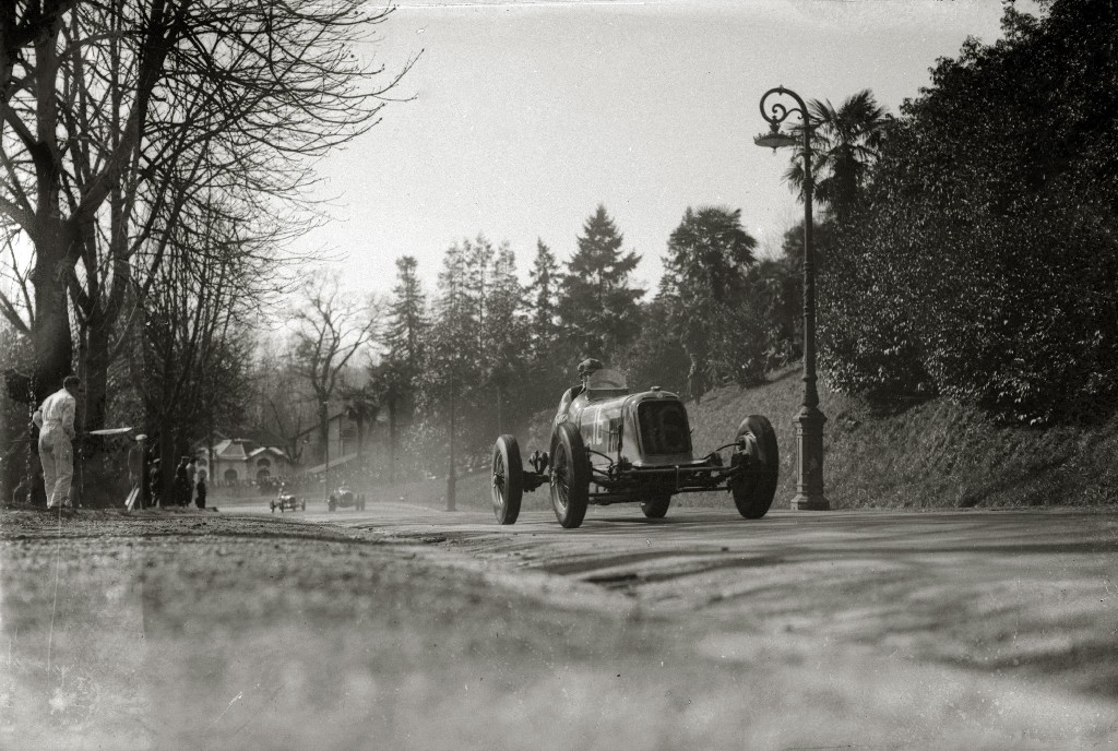 Título original: Grand Prix de Pau (7/20) Localización: Pau (Francia)